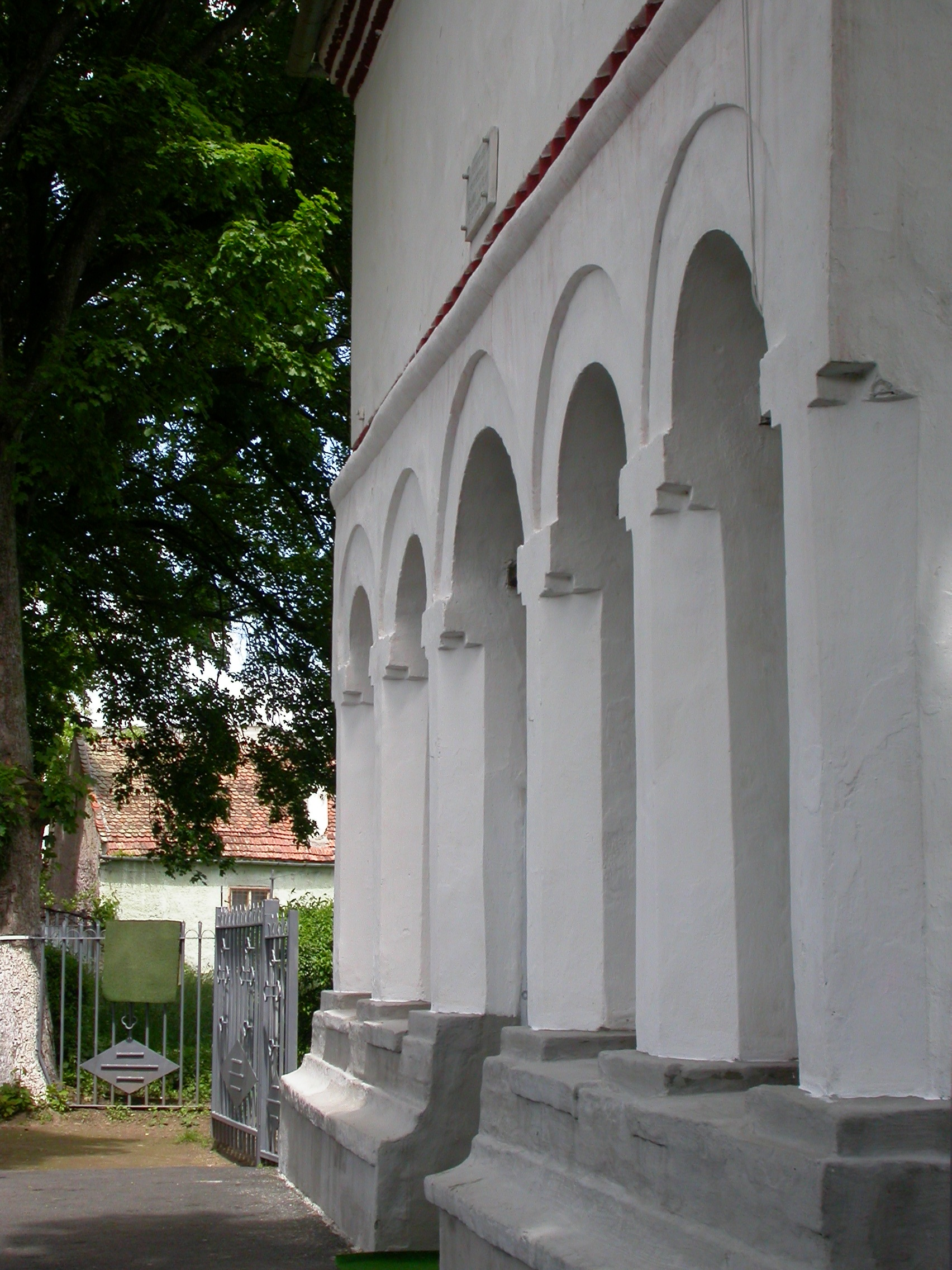 Biserica "Sf. Nicolae"- Brâncoveanu, 1697 - 1698